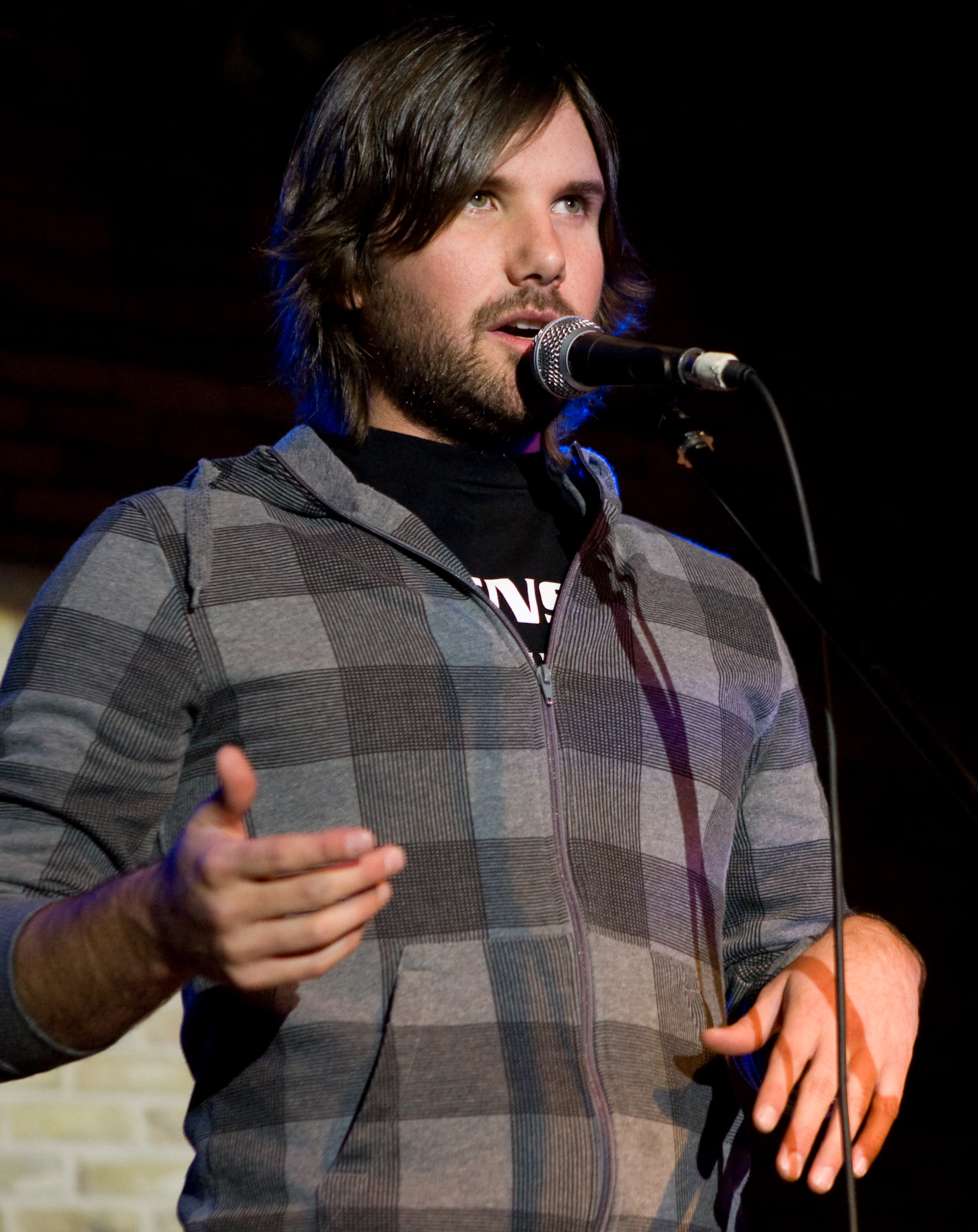 Jon Lajoie Live @ the Pyramid, December 2nd, 2008. South Portage, Winnipeg, MB, Canada